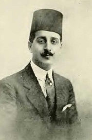 Մուհամմադ Թեյմուր